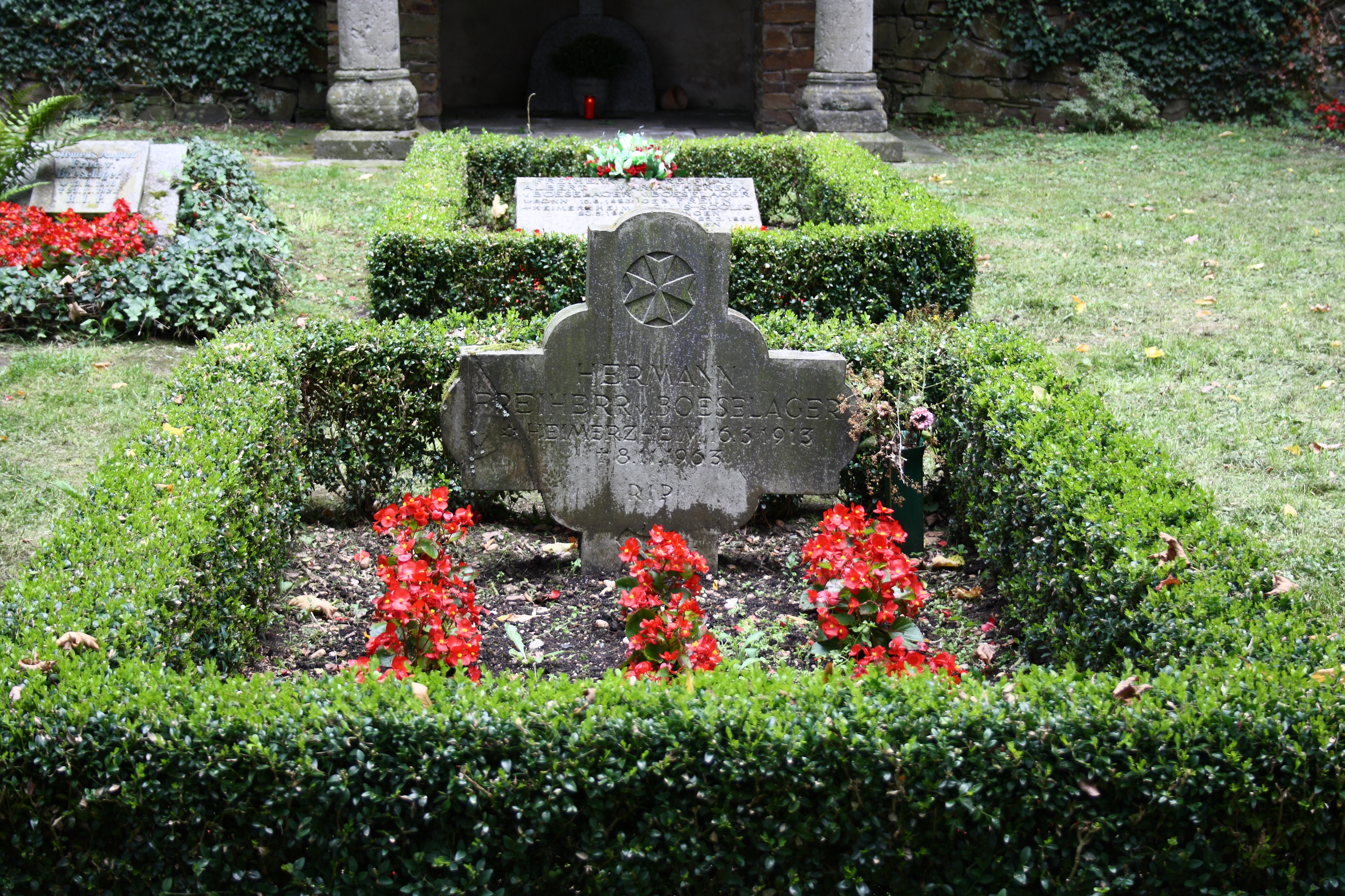 Burg Heimerzheim in Heimerzheim, einem Ortsteil von Swisttal im Rhein-Sieg-Kreis Hermann-Josef Freiherr von Boeselager